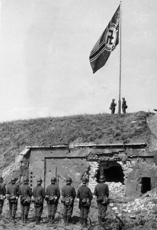 Westerplatte, hissen der Reichskriegsflagge Die Einnahme der Wester-Platte am 8.9.1939 Bild Nr. A 73078, 9.9.1939 [Herausgabedatum] Bild: Haine Die deutsche Kriegsflagge wird auf der Westerplatte gehisst. Die Tapferkeit der deutschen Truppen zwang die polnischen Besatzung nach hartnäckigem Widerstand zur Übergabe. [Danzig, Westerplatte.- Angetretene Soldaten vor wehender Reichskriegsflagge] The income of the west plate at 8.9.1939 Picture No. A 73078, 9.9.1939 [publication date] Picture: Haine the German war flag is go-eaten on the Westerplatte. The bravery of the German troops forced the Polish crew after persistent resistance to the delivery. [Danzig, Westerplatte. - Begun soldiers before blowing realm war flag]